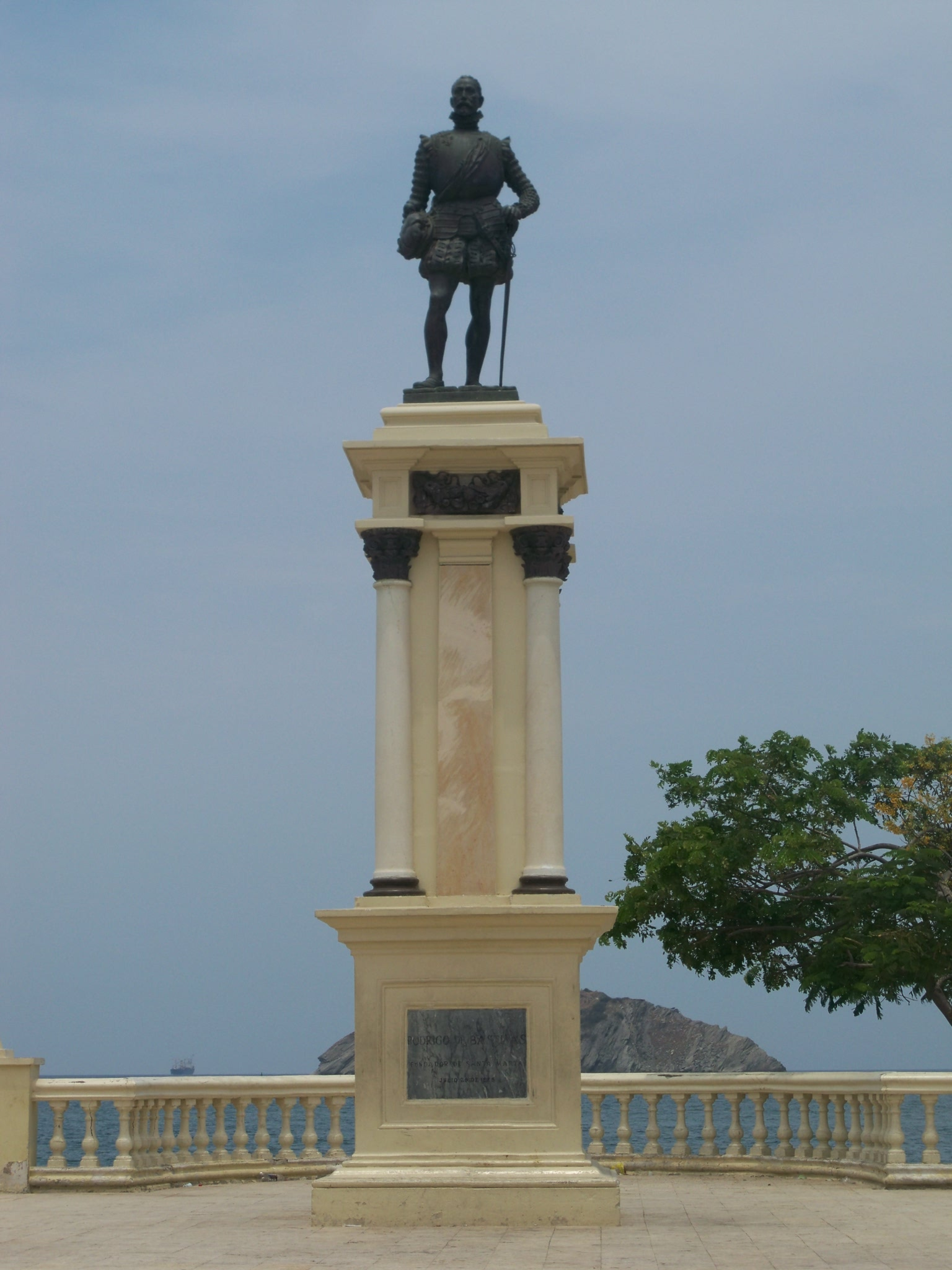 Monumento de Rodrigo de Bastidas en Santa Marta, Colombia.